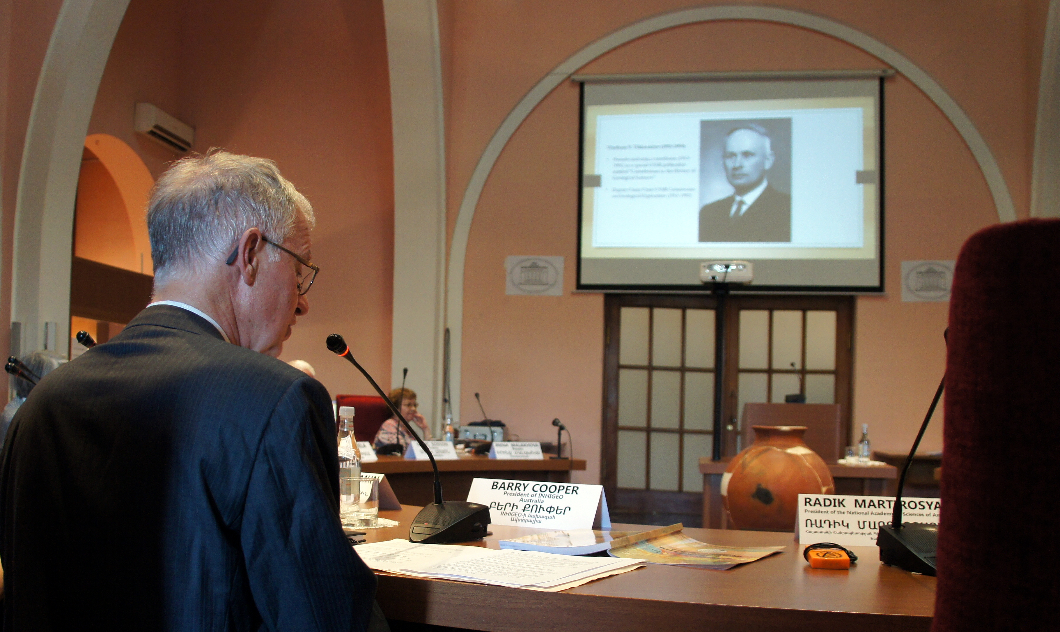 Выступление президента ИНИГЕО (INHIGEO) Барри Купера о истории создания организации.